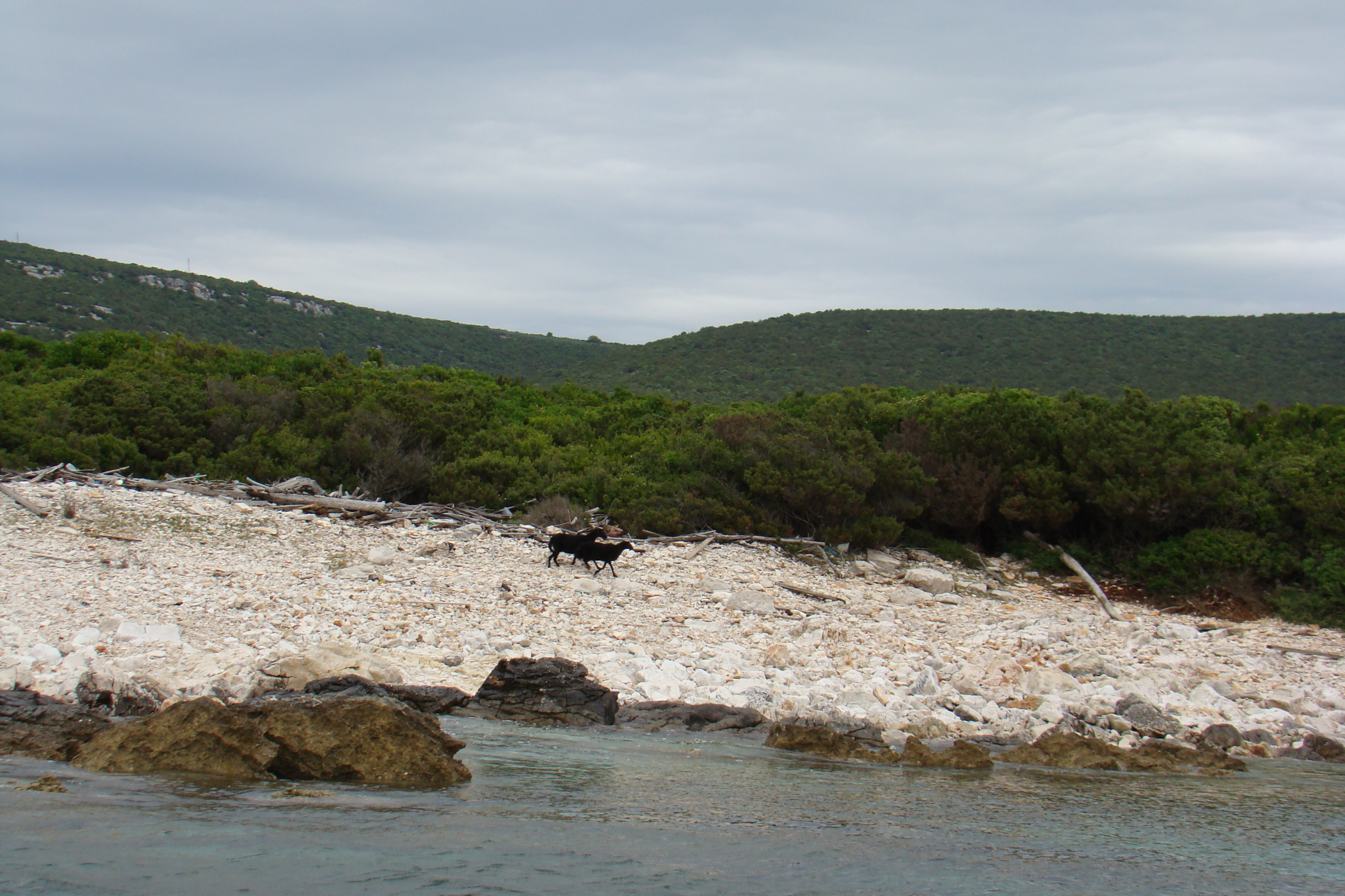 Kozy